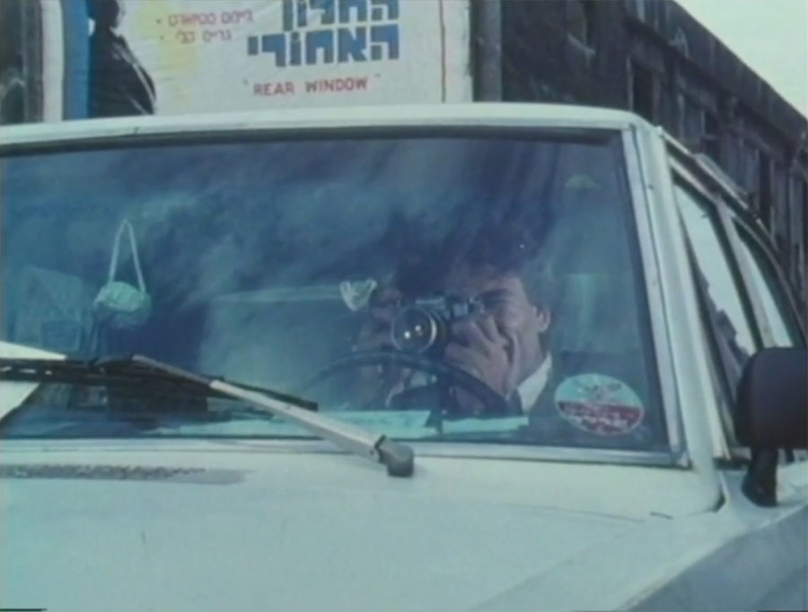 אבי אבוטבול קידר - הצלם שנכלא במכוניתו